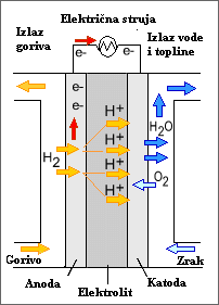 Dijagram PEM gorive ćelije